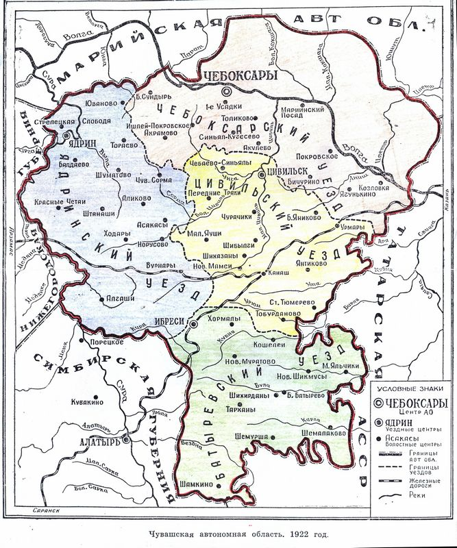 Чувашская автономная область, 1922 год